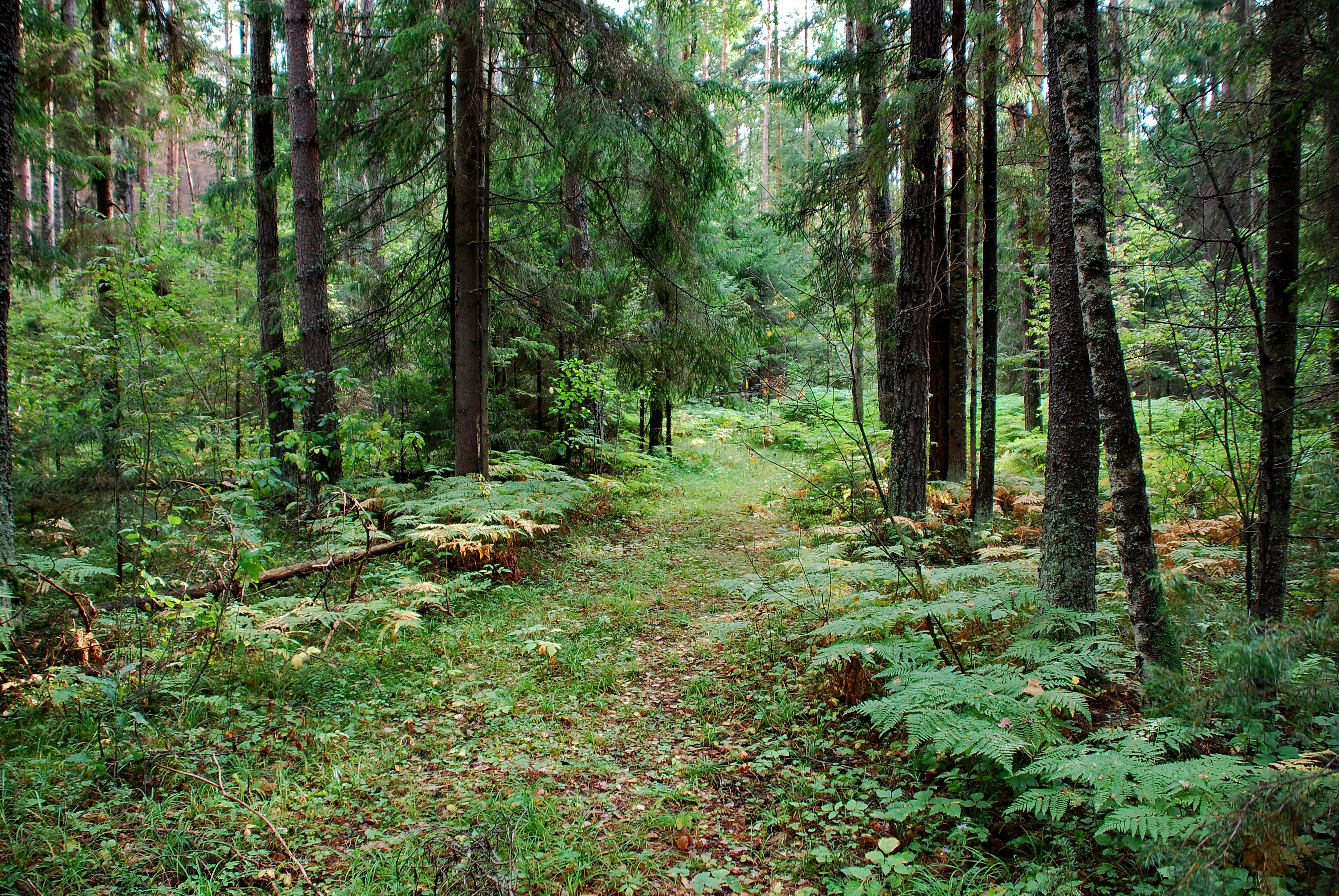 Лесные дорожки